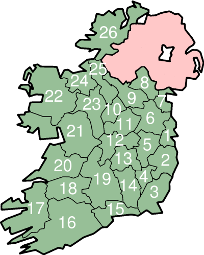 Condados numerados da República da Irlanda